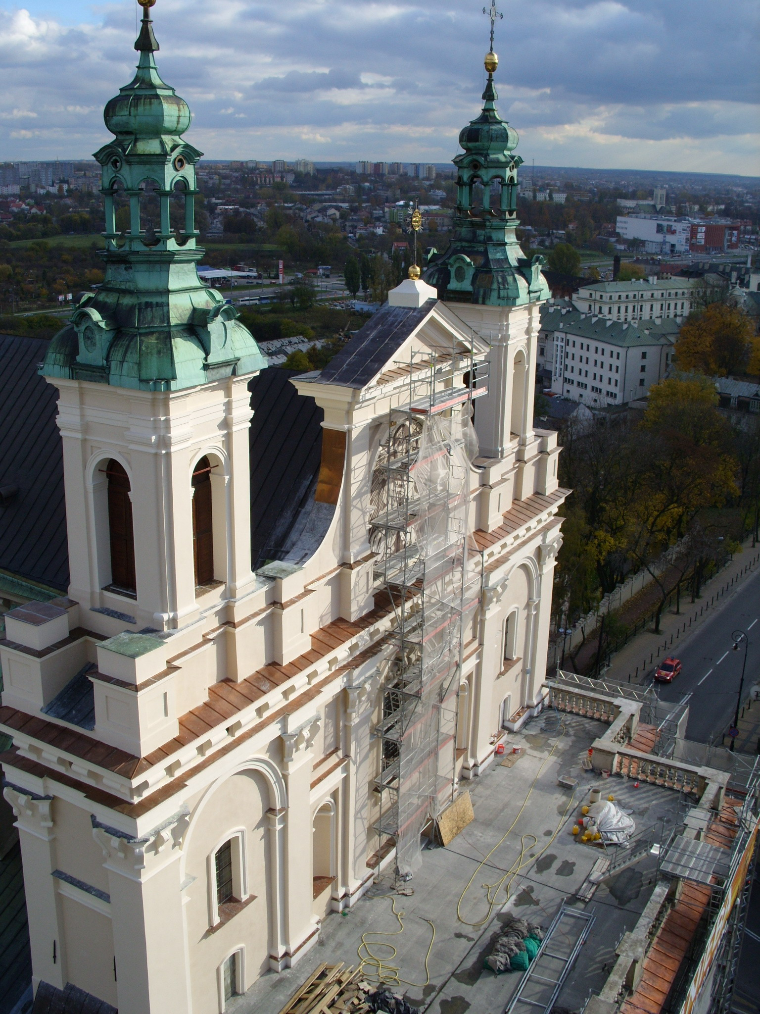 A lublini katedrális (Lengyelország)